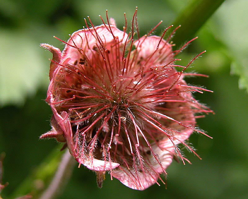 Bach-Nelkenwurz (Geum rivale), aufgenommen in der Nähe von Gerstruben (Allgäuer Alpen)